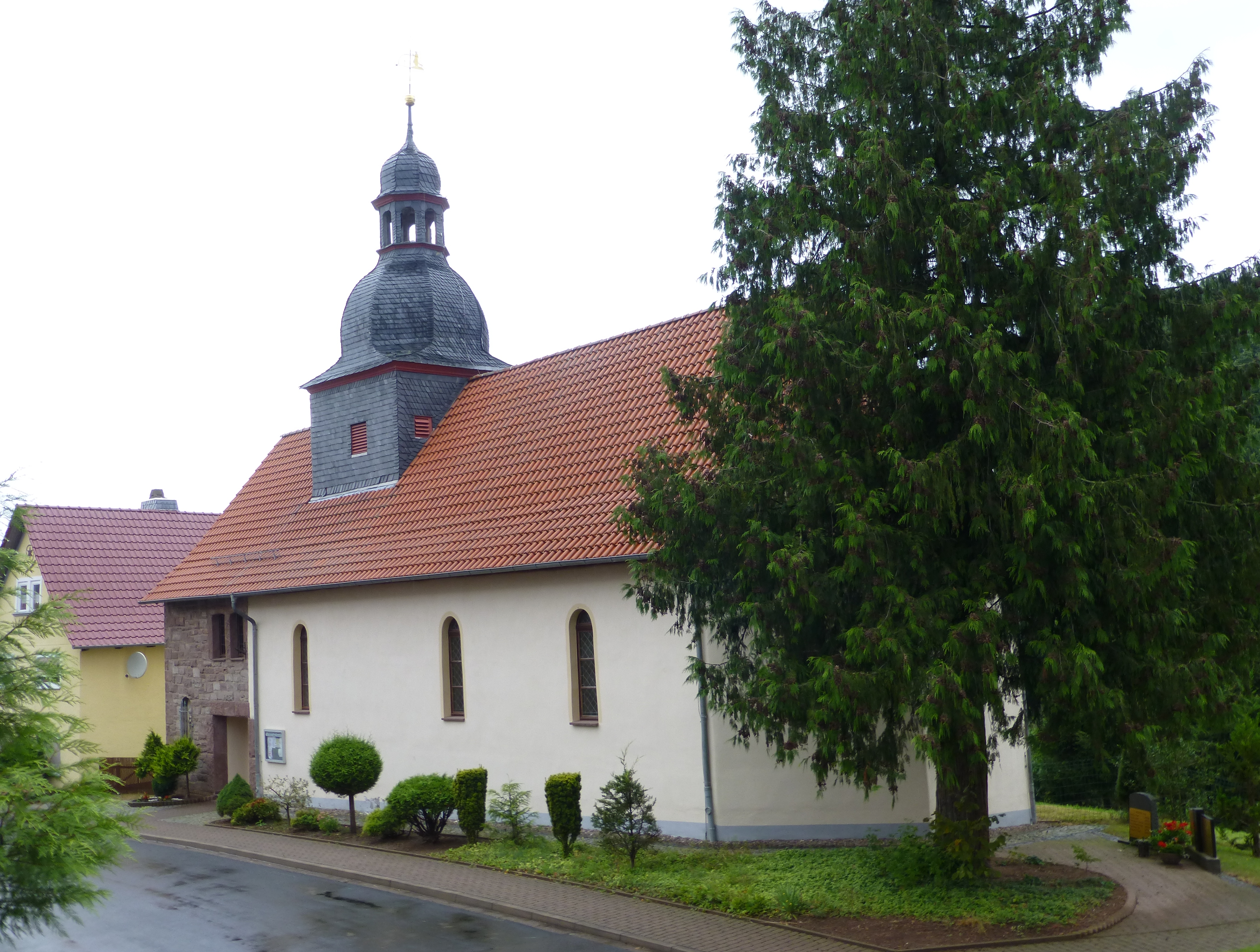 Kath. Kirche St. Johannes der Täufer in Glasehausen, Landkreis Eichsfeld